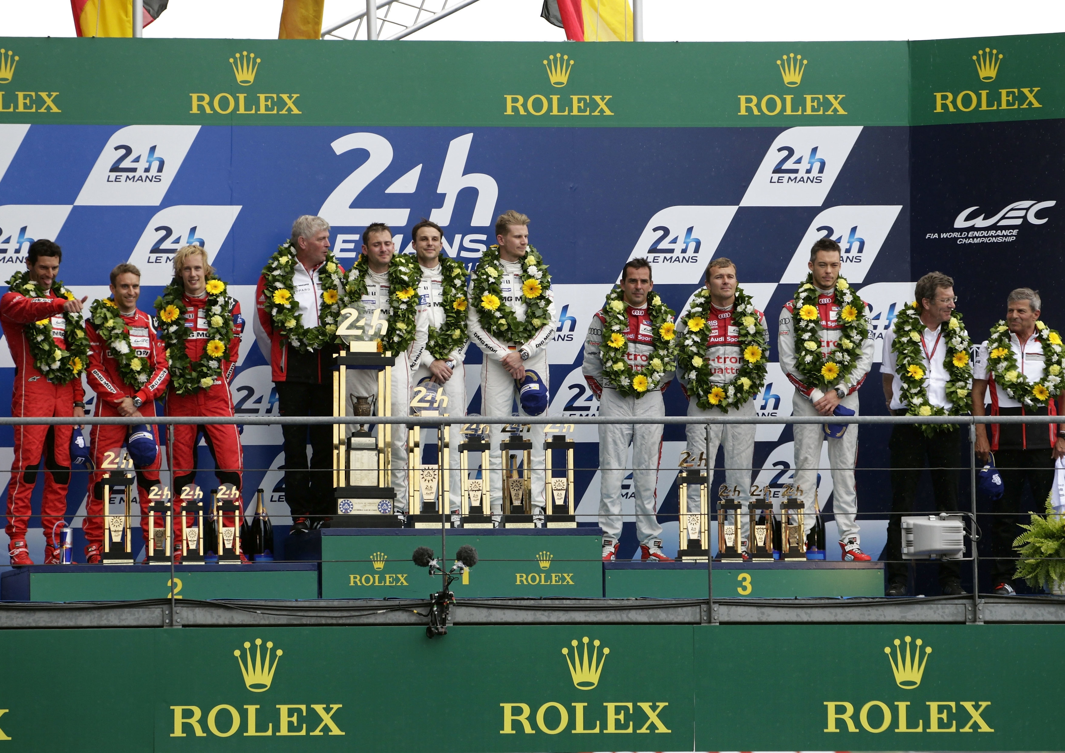 Siegerehrung in Le Mans